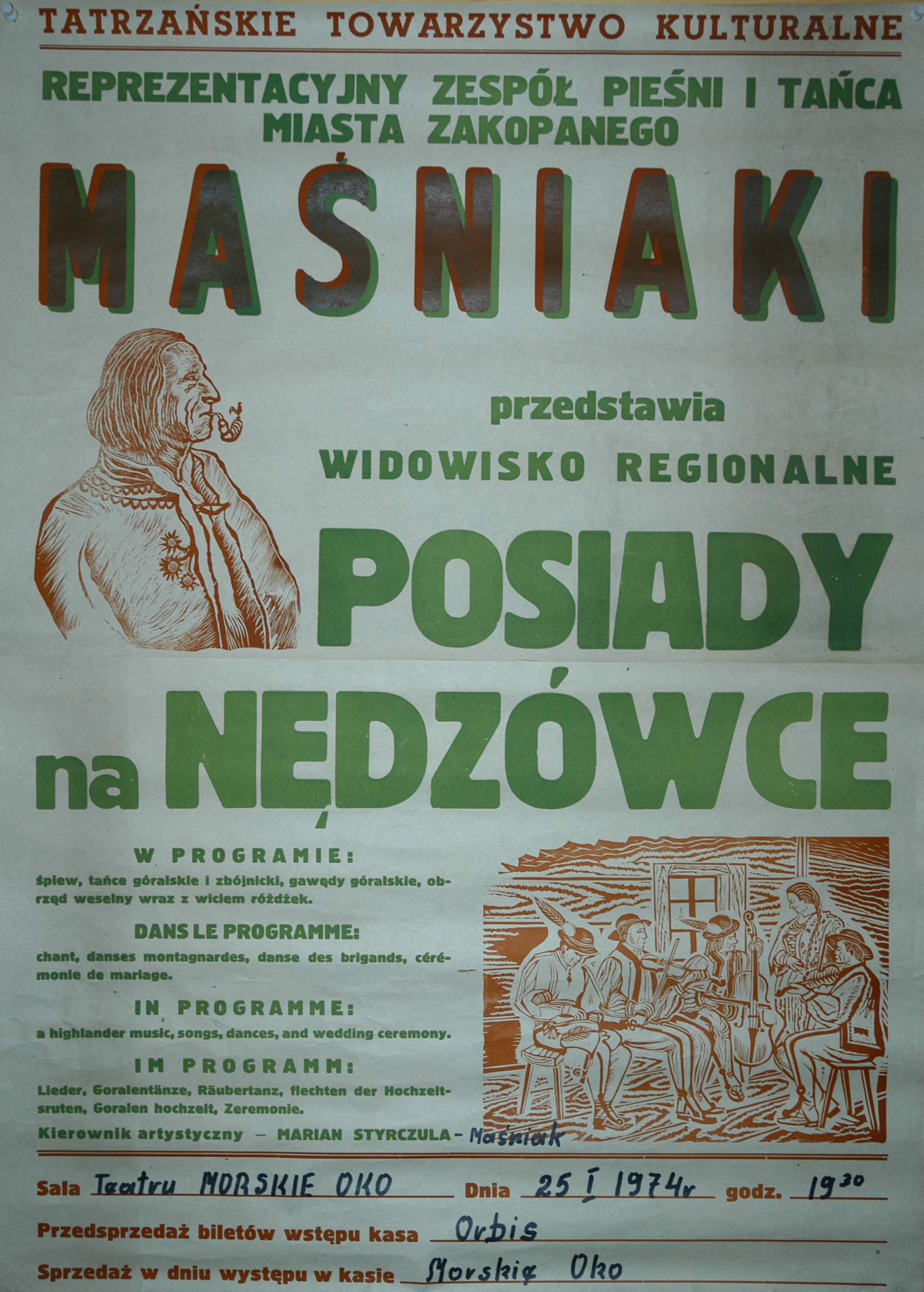 Koncerty w teatrze "Morskie Oko" - afisz